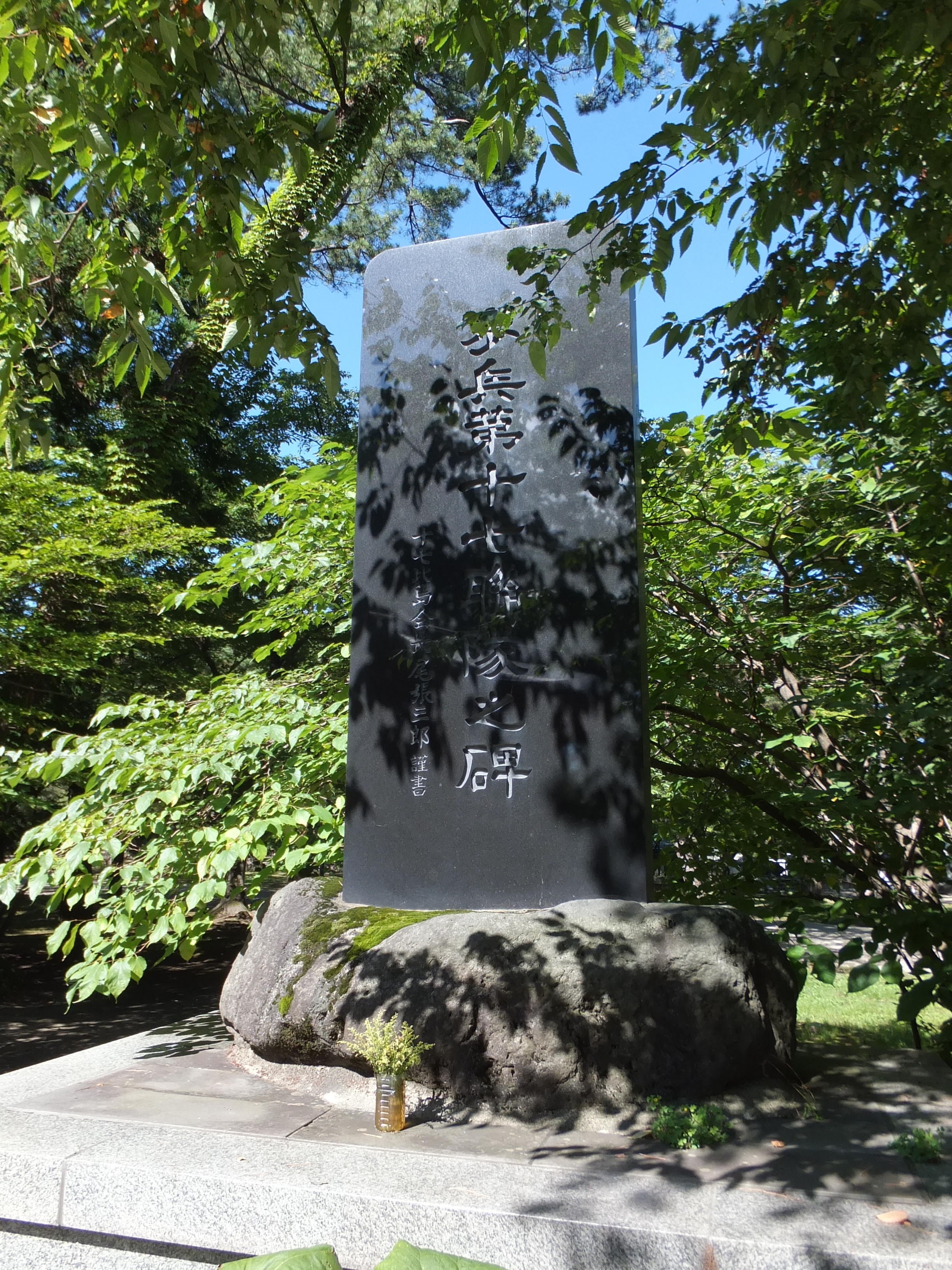 秋田市・千秋公園内にある、歩兵第十七連隊の碑